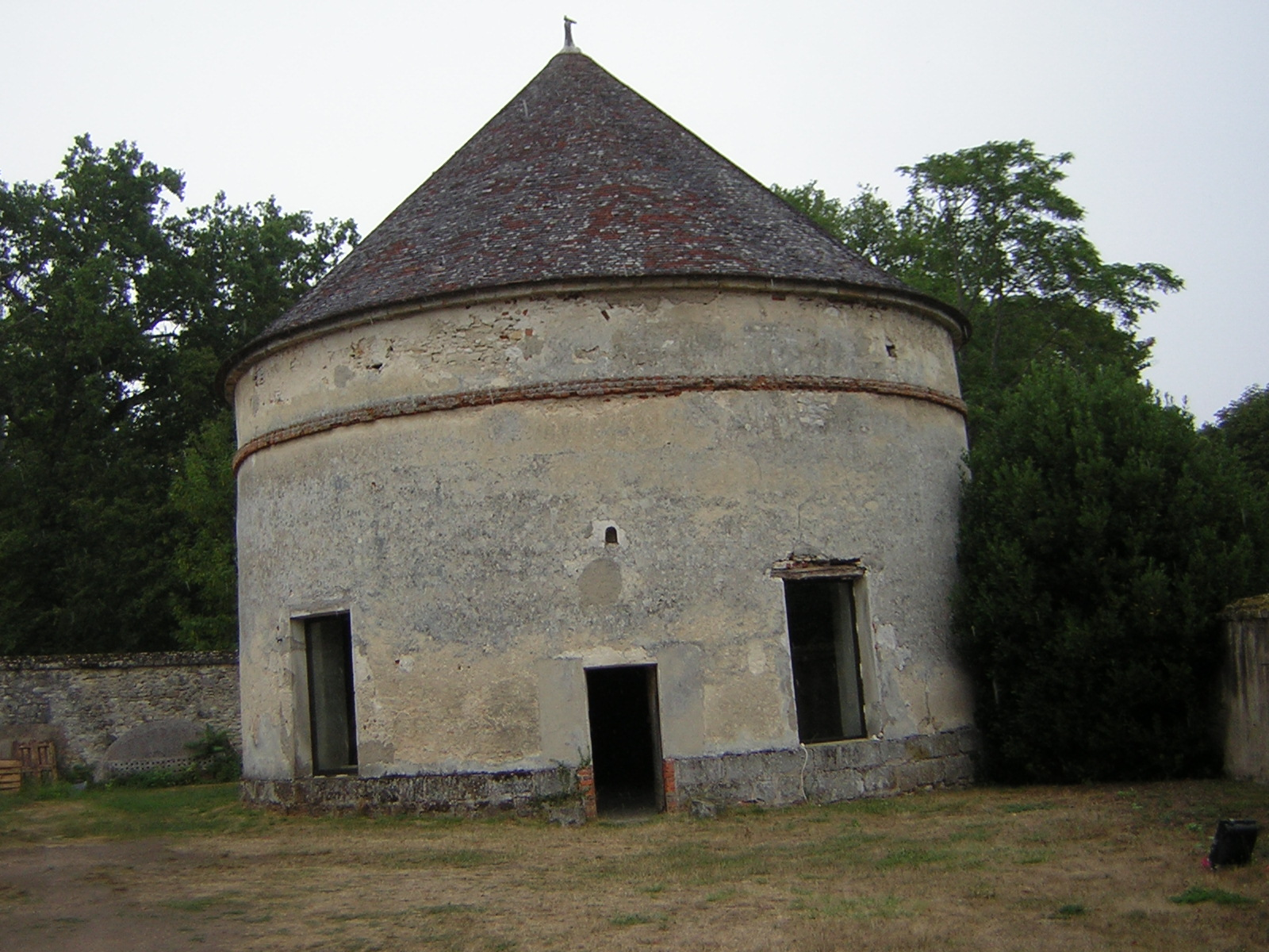 Malesherbes (45) Colombier du château